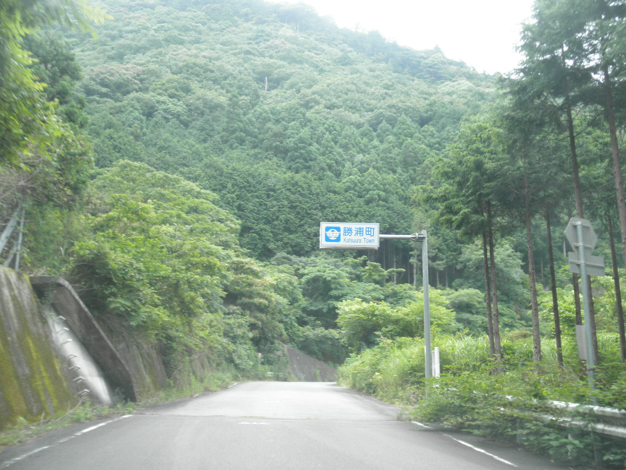 徳島県勝浦郡勝浦町生名鷲ケ尾 徳島県道283号和食勝浦線